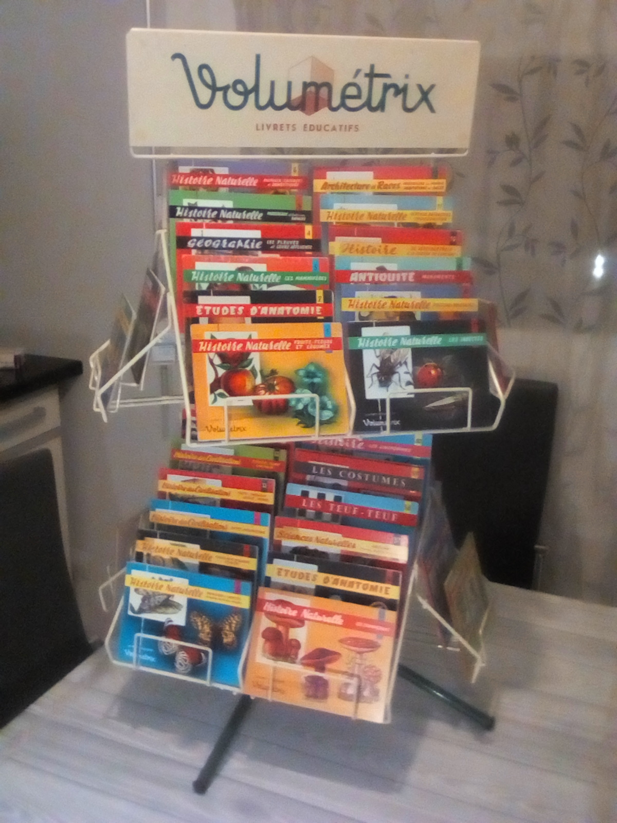 les livrets éducatifs Volumetrix tels qu'ils se vendaient en librairie dans les années 1960. Photo volontairement prises de loin pour respecter les droits d'auteur